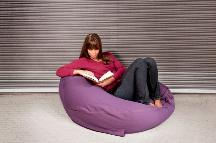 Abgebildet ist der Sitzsack Billy in der Farbe Aubergine. Made in Germany